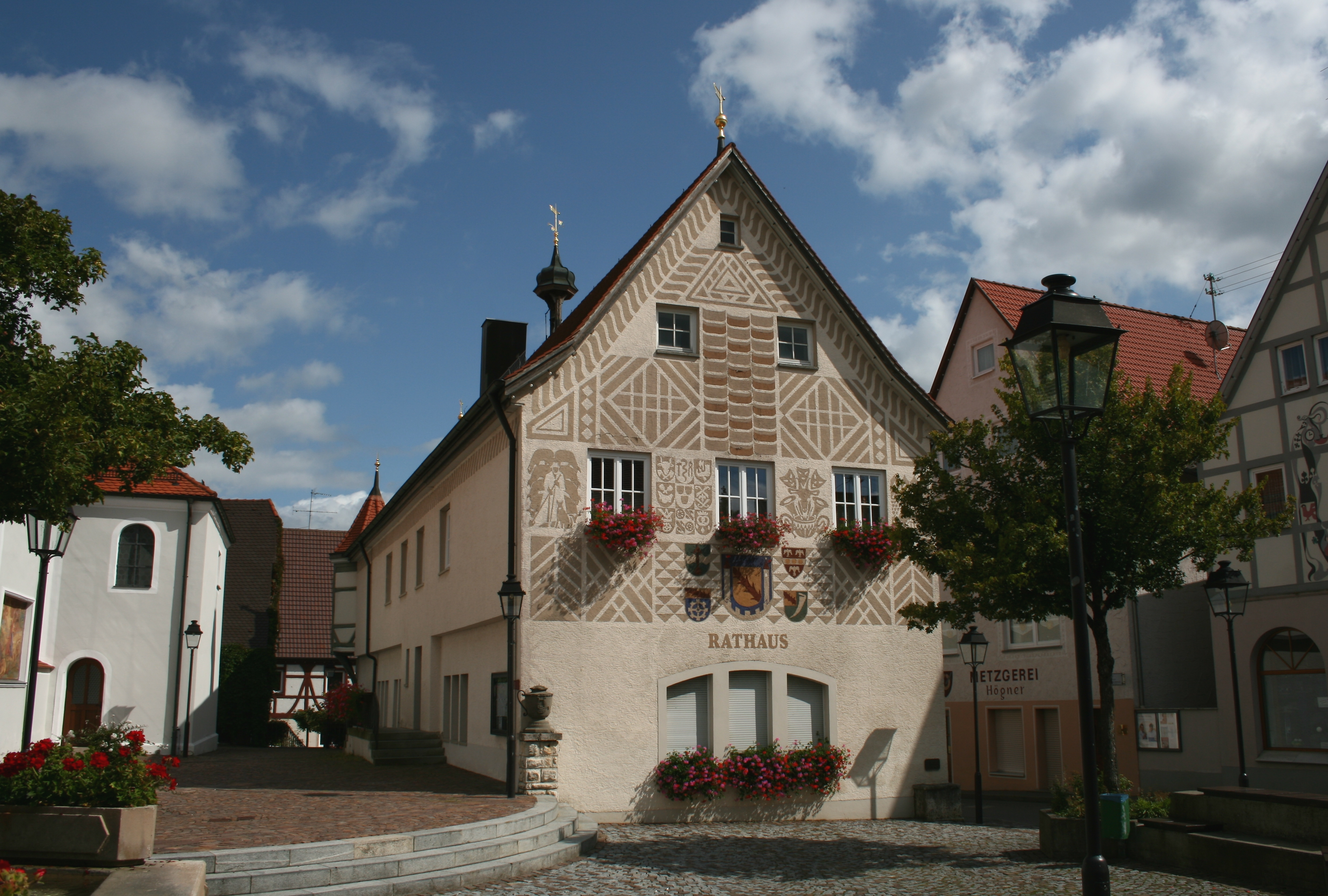 Rathaus in Hayingen auf der Schwäbischen Alb